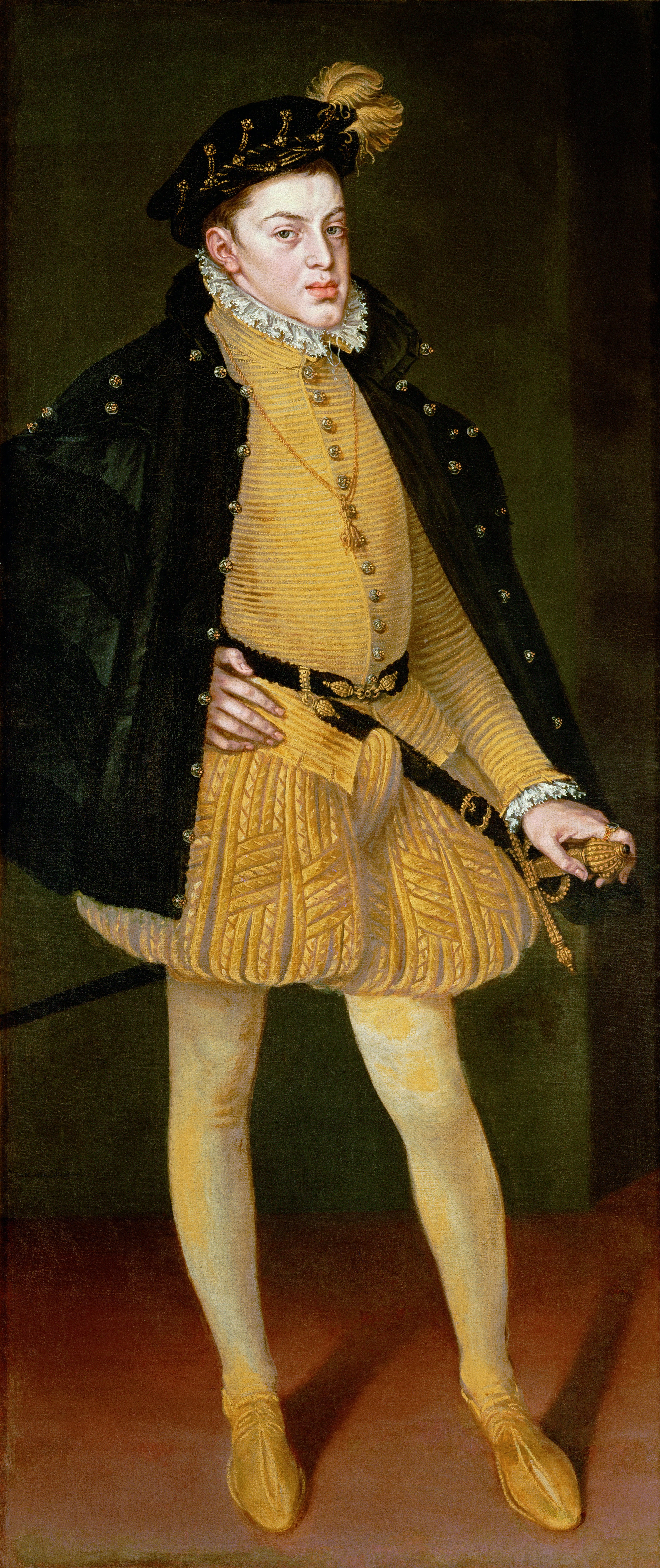 Retrato del príncipe de Asturias Carlos de Austria, que fue el hijo primogénito del rey Felipe II de España y de la reina María Manuela de Portugal, primera esposa de Felipe II.